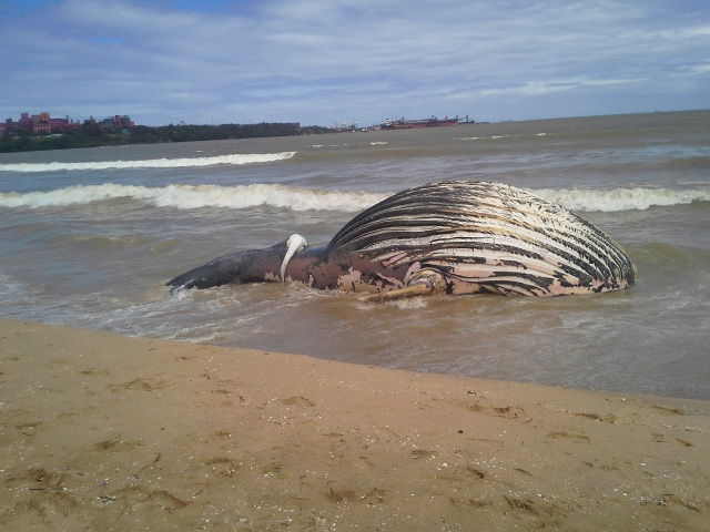 Baleia , morta no Praia de camburi, vitória , E.S.